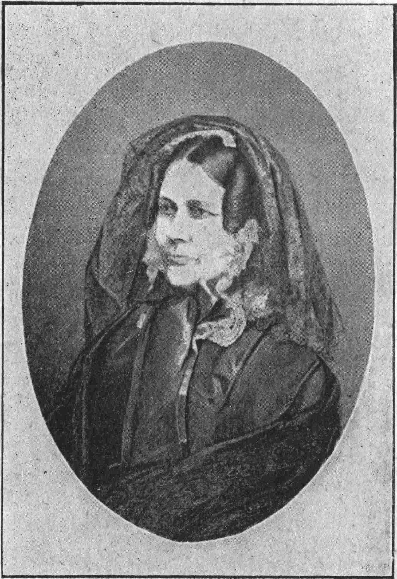 Portrait de Sophie Rostopchine page 4 des Lettres d'une Grand'mère, lettres posthumes de comtesse de Ségur écrites à son petit fils et éditée par sa fille.